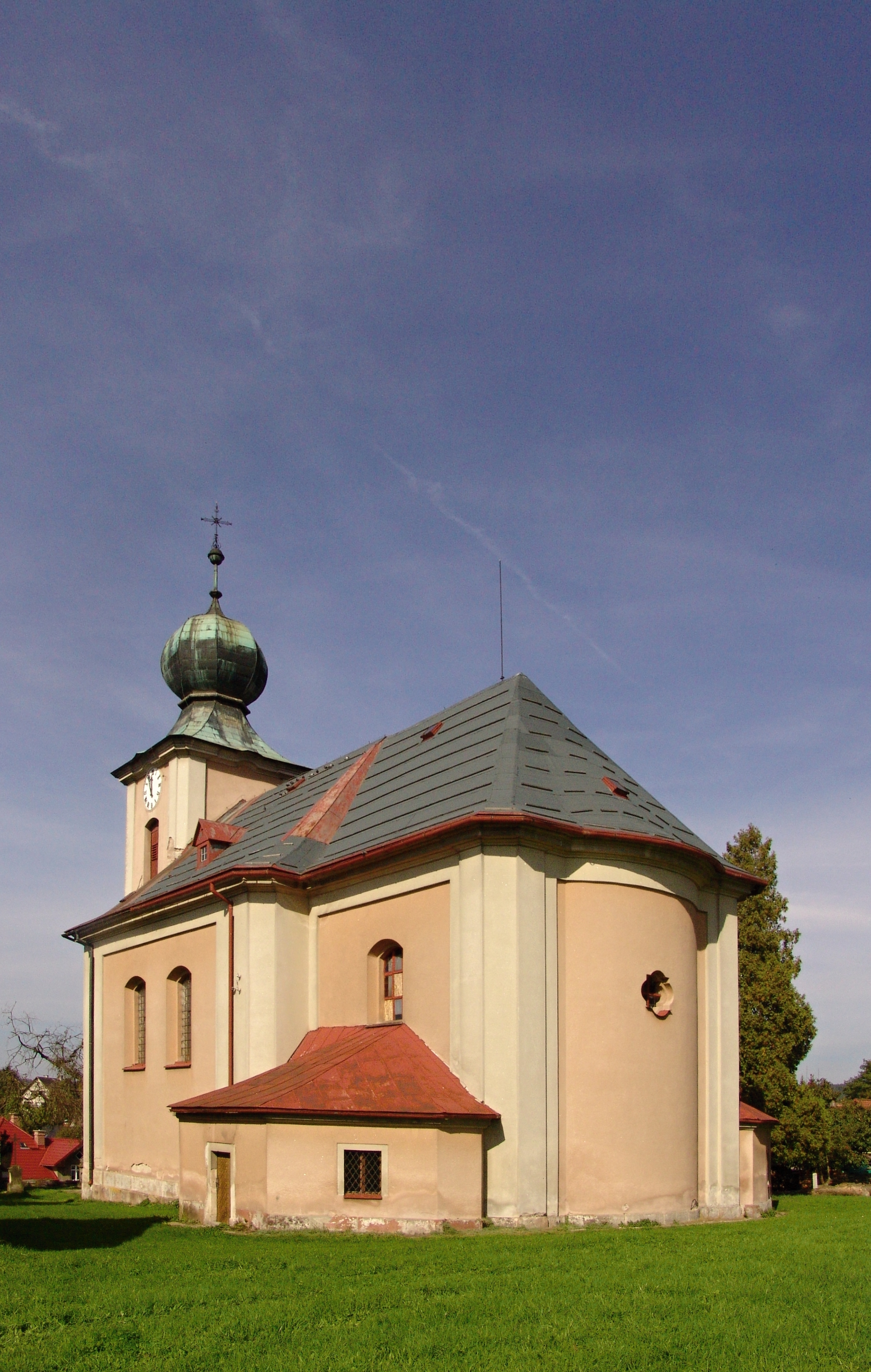 Kostel svatých Filipa a Jakuba, Roztoky u Jilemnice.